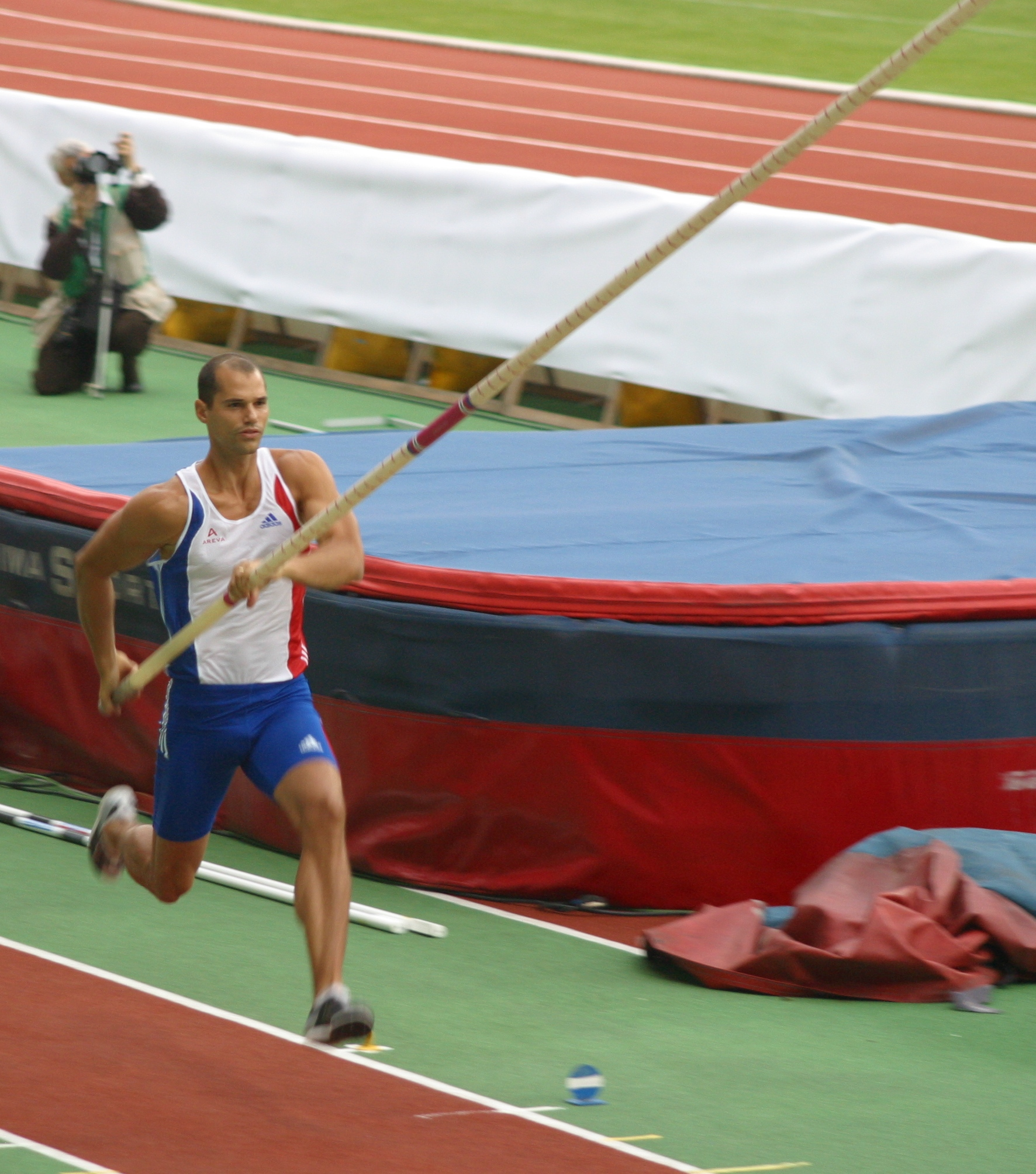 Romain Mesnil en action